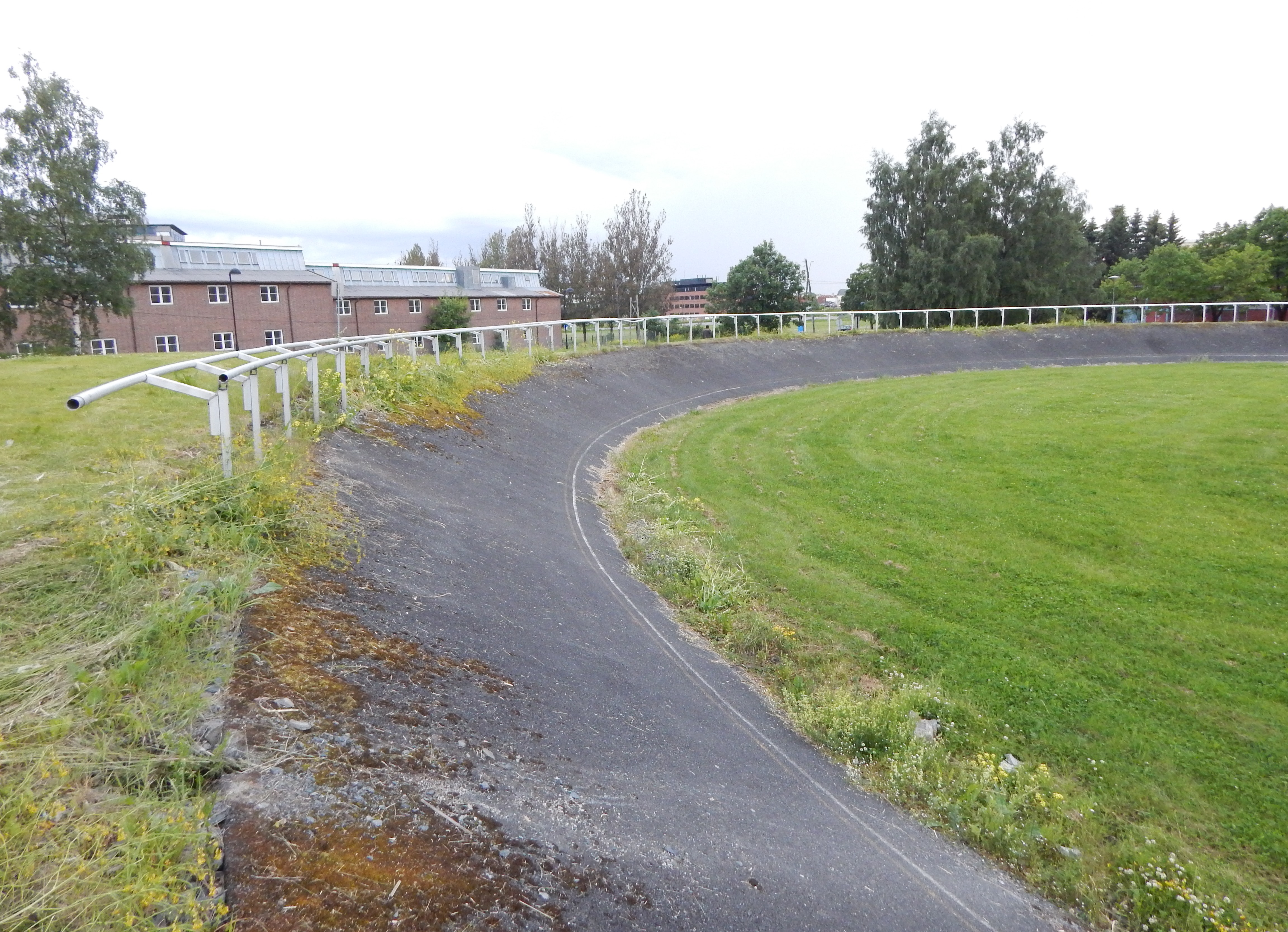 Tidligere sykkelvelodrom øst for Valle Hovin